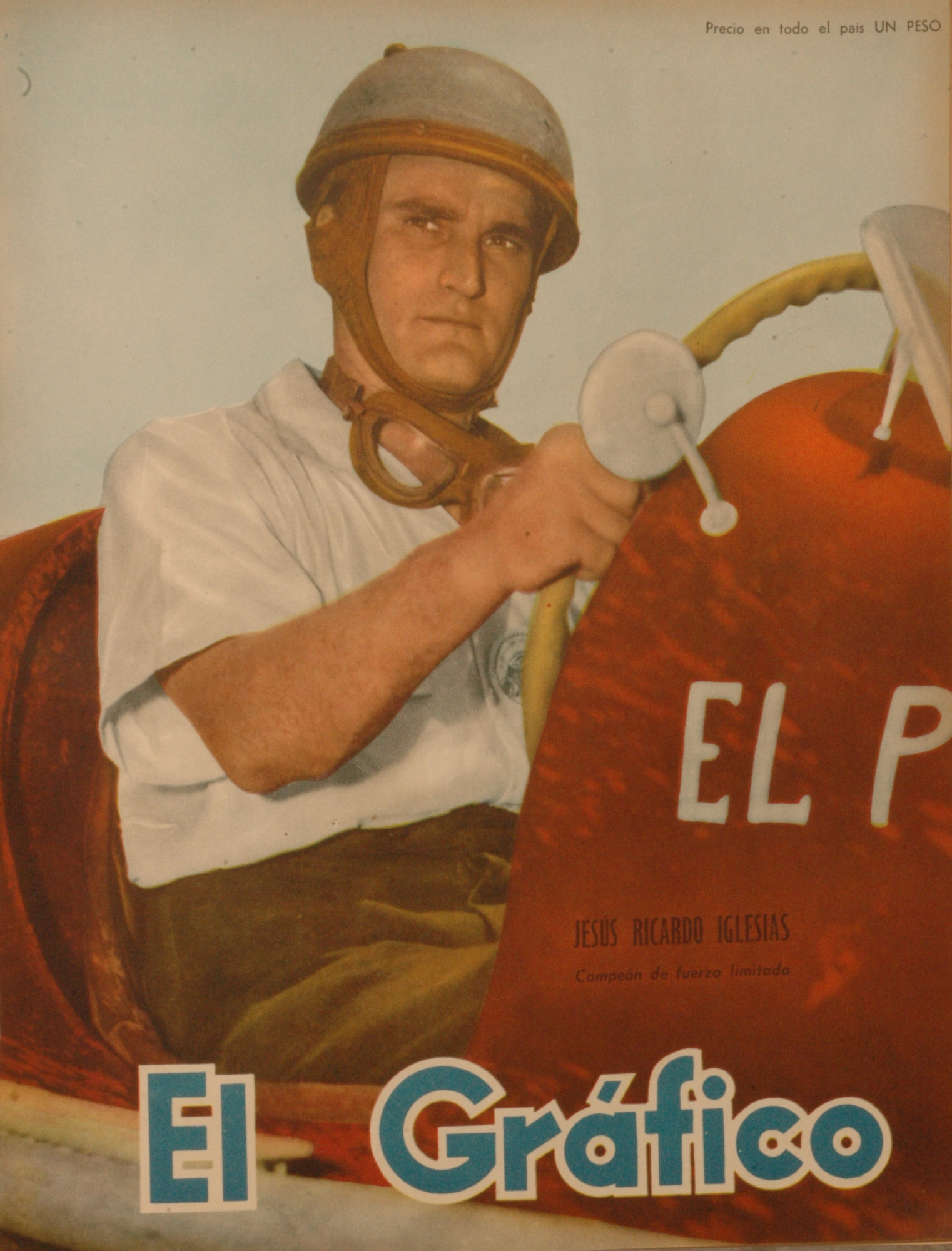 El Grafico del 07 de Diciembre de 1951. Edicion 1687